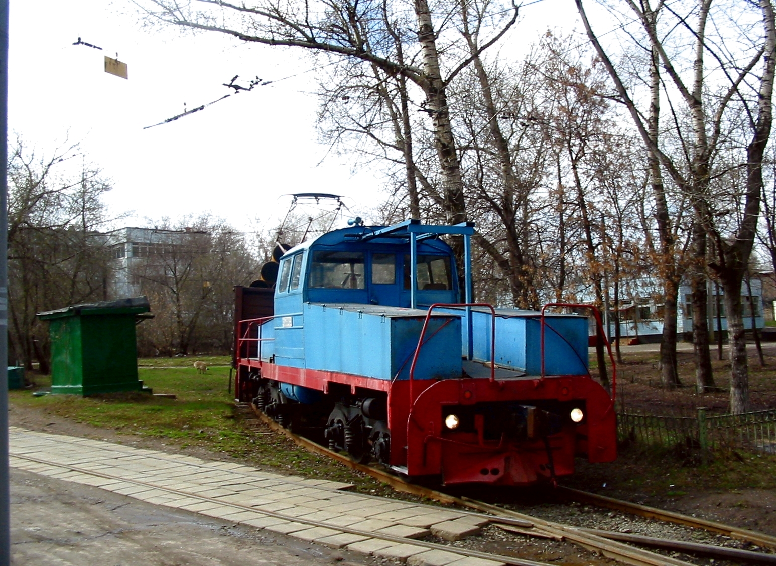 Tram-train shunter loco EPM3B-2099. Moscow, Ugreshkaya tram station. Work on short access track from Ugreshkaya RZD station to Mosgortrans mainteniance base. Tracks electrified at 600 DC, and share railway and tram traffic. Маневровый теплоэлектровоз ЭПМ3Б-2099 на трамвайной станции Угрешская, Москва. Работает на подъездном пути от станции Угрешская МЖД к базе материально-технического обеспечения Мосгортранс, который электрифицирован на 600В, и совмещён с трамвайными путями. Перестроен в 1980-х годах из тепловоза ТГМ3.